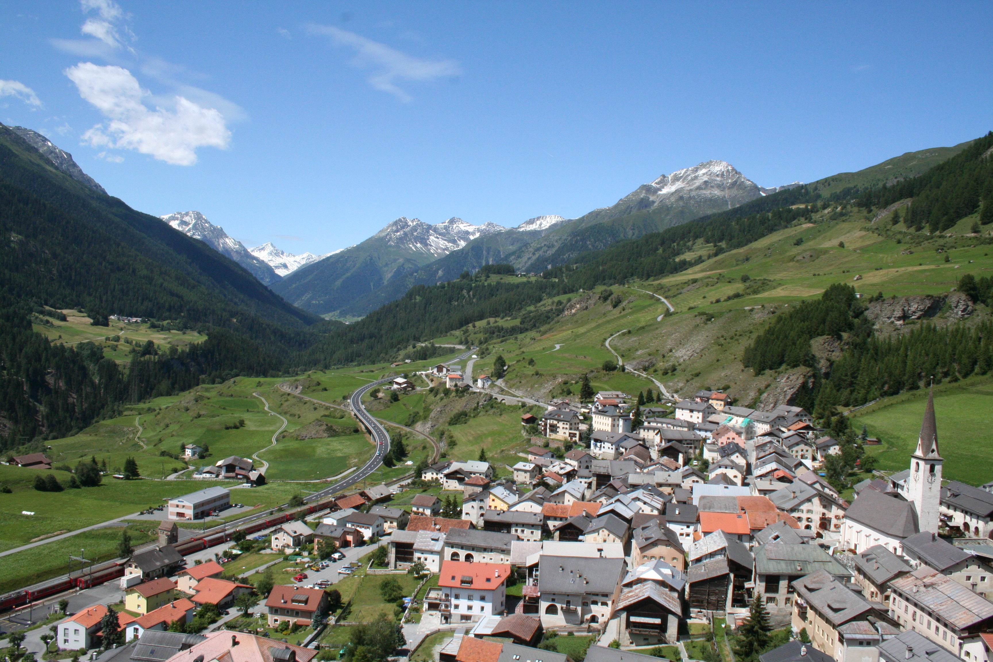 Ardez, Blick nach Norden